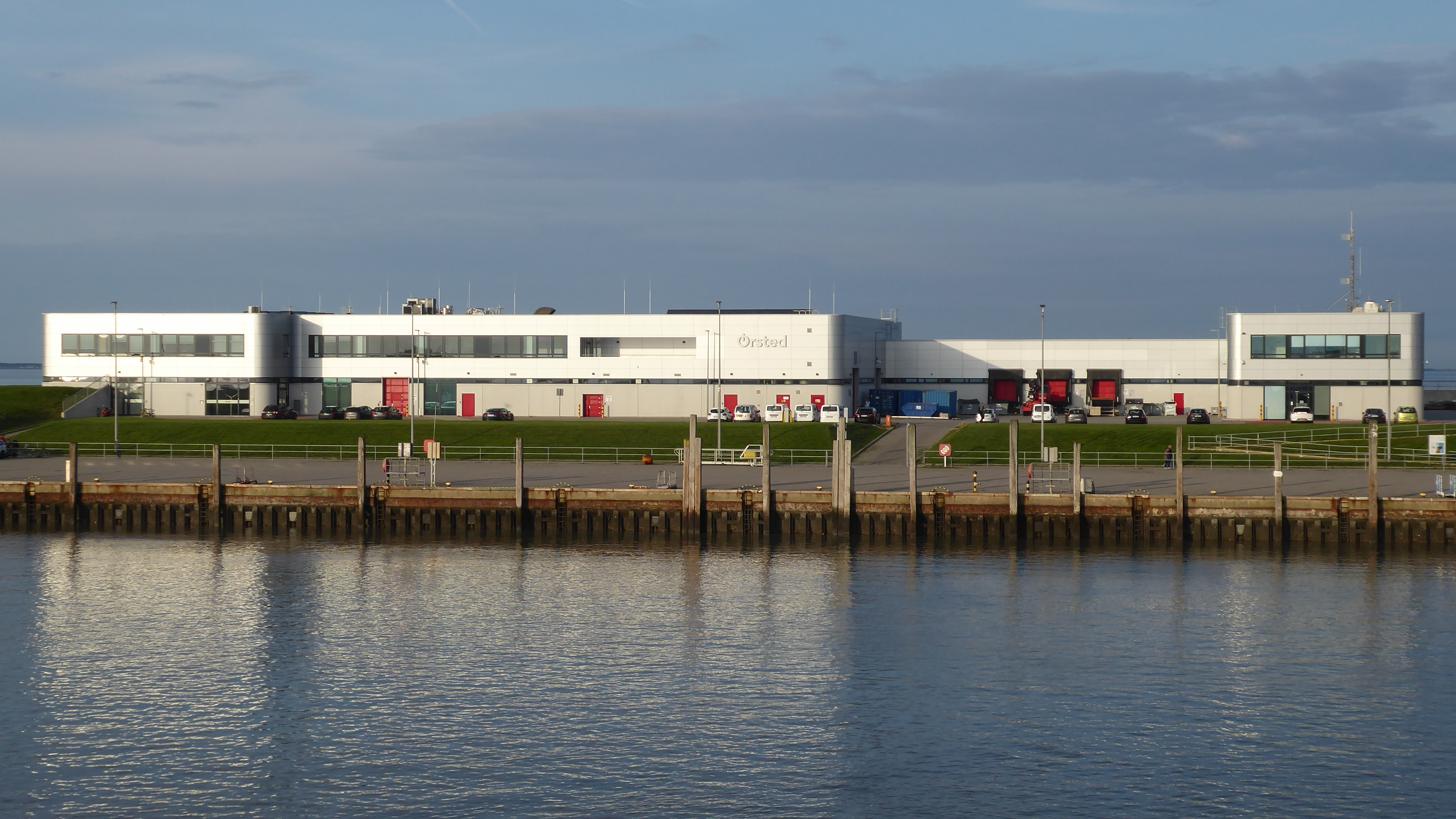 Ørsted Wartungs- und Servicestützpunkt in Norddeich für Offshore-Windparks